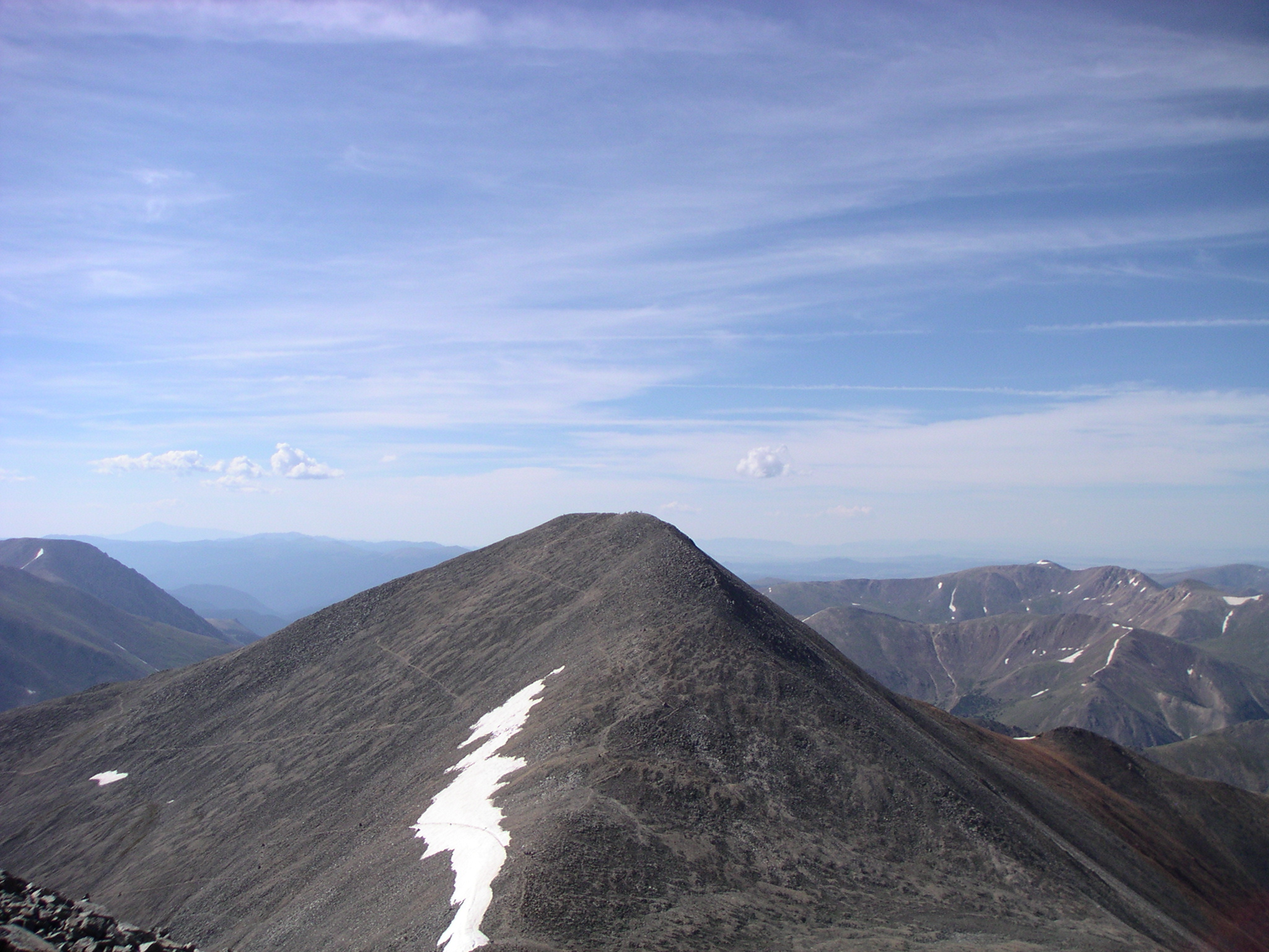 Colorado Cup 2005